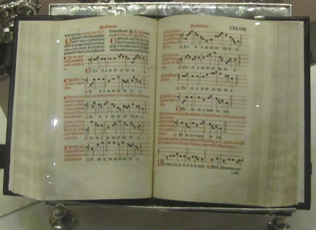 Aragonés: año 1522. Impreso. Encuadernado en piel con tablas de hierros. Zaragoza. Catedral de El Salvador. Biblioteca capitular.